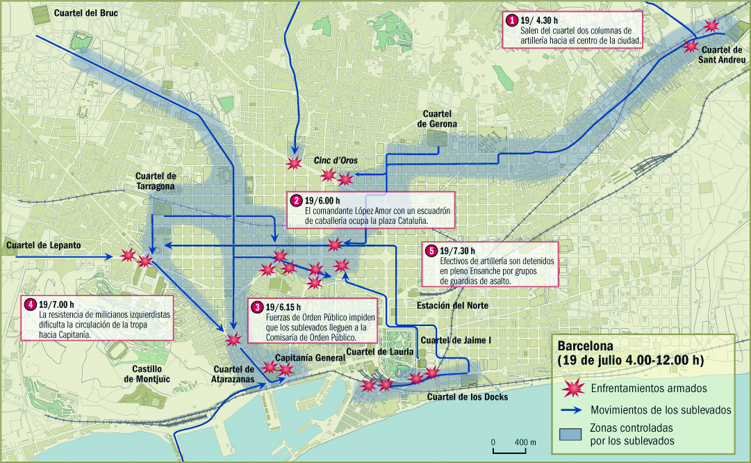 Infografía que narra los combates ocurridos en Barcelona el día 19 de julio de 1936. Página 55 del libro "La sublevación".